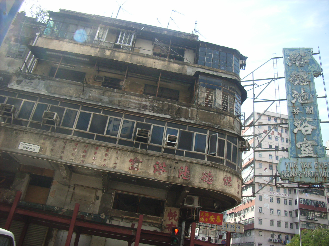 浴德池 (Yuk Tak Chee Sauna) 是香港第一間上海澡堂，位於旺角zh:太子道西123號地下及2樓 Photo by User:OLAMB.